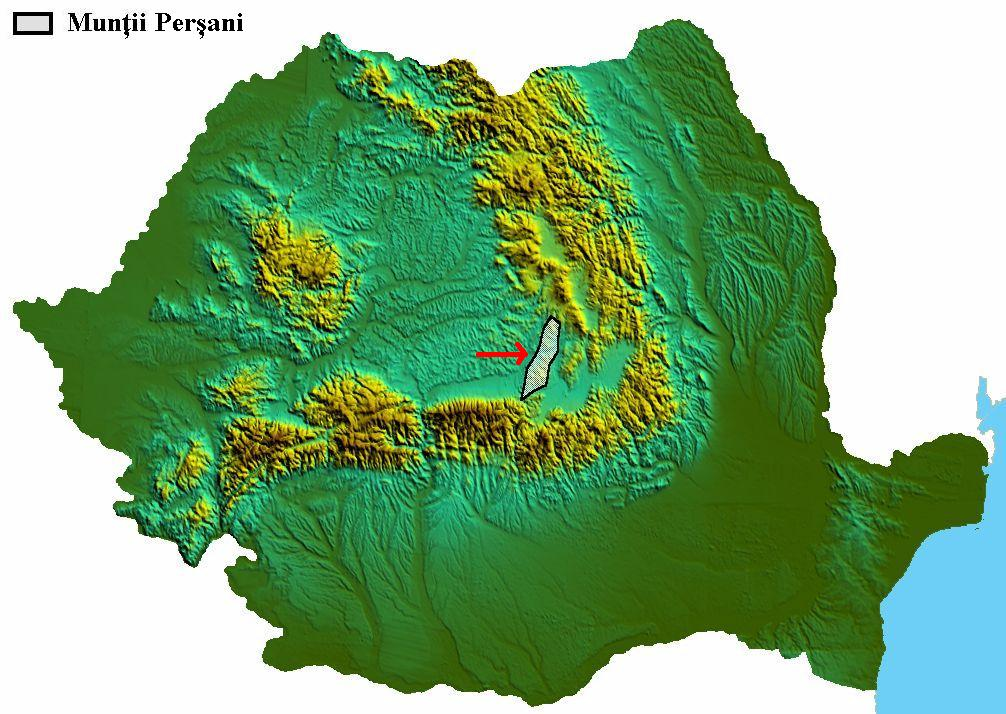 Munţii Persani